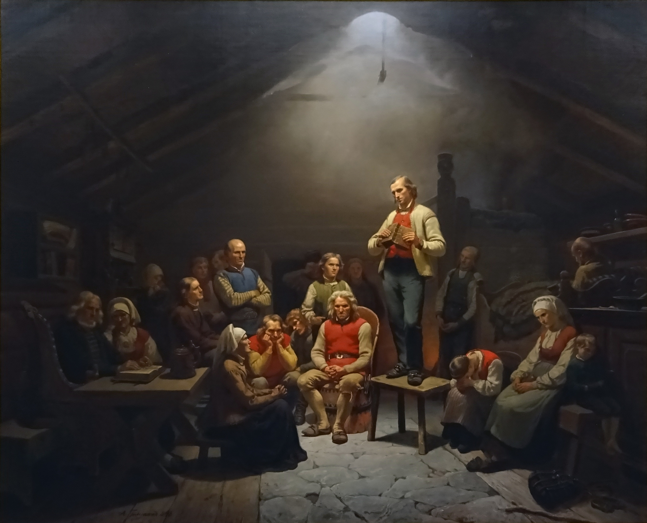 Adolph Tidemand, Die Andacht der Haugianer, 1848, Öl auf Leinwand, 1848 erworben durch den Galerieverein und den Kunstverein für die Rheinlande und Westfalen, Inv.-Nr. M 4056